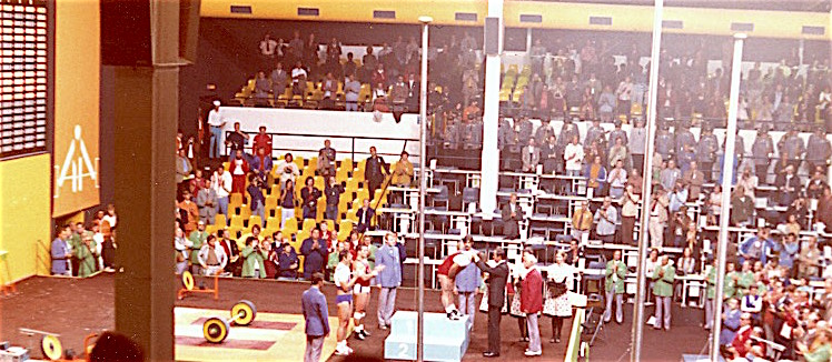 Konstantin II. von Griechenland hängt dem Gewichtheber Leif Jensen die Goldmedaille um.